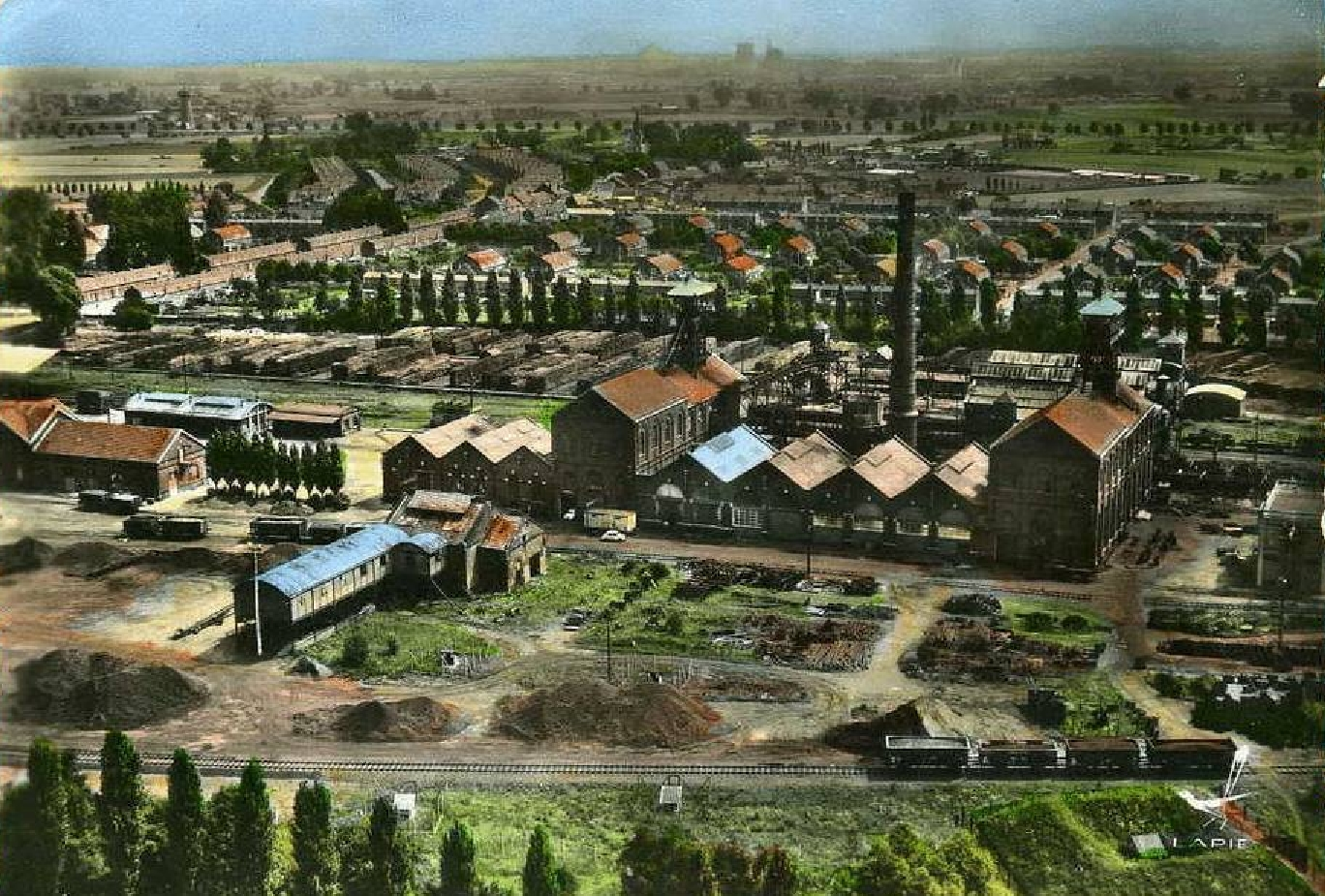 Photochrome de la fosse De Sessevalle, qui était une mine souterraine de houille exploitée par la Compagnie des mines d'Aniche, puis par le Groupe de Douai au nord de Somain, près de Rieulay, dans le bassin minier du Nord-Pas-de-Calais, en France. Cette image présente une vue d'ensemble de la fosse. La présence du château d'eau indique que la photo a été prise après 1935.